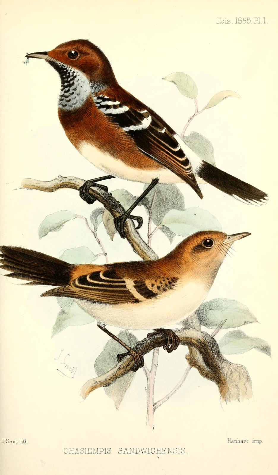 Chasiempis sandwichensis